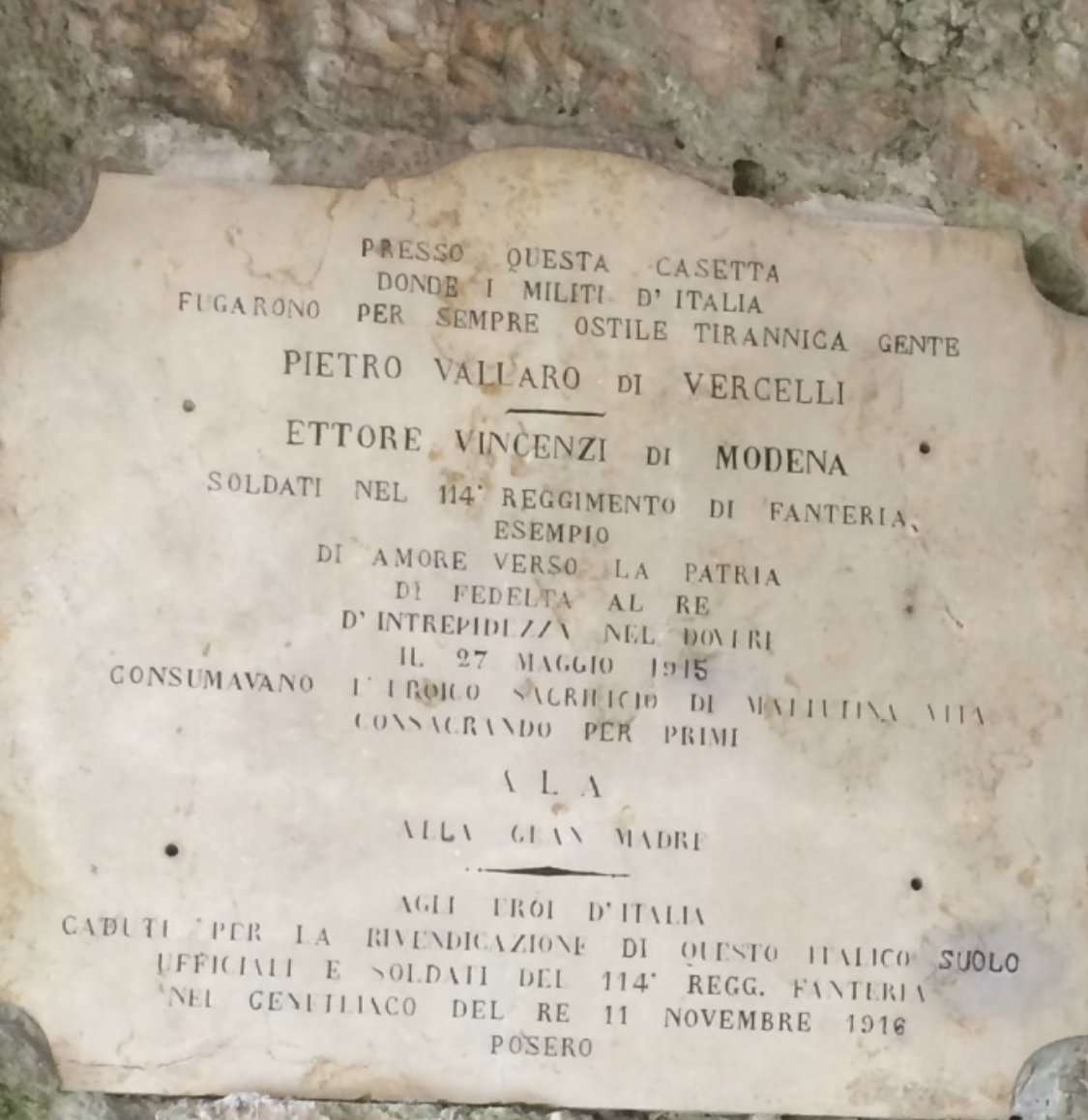 Primi morti della prima guerra mondiale in Trentino